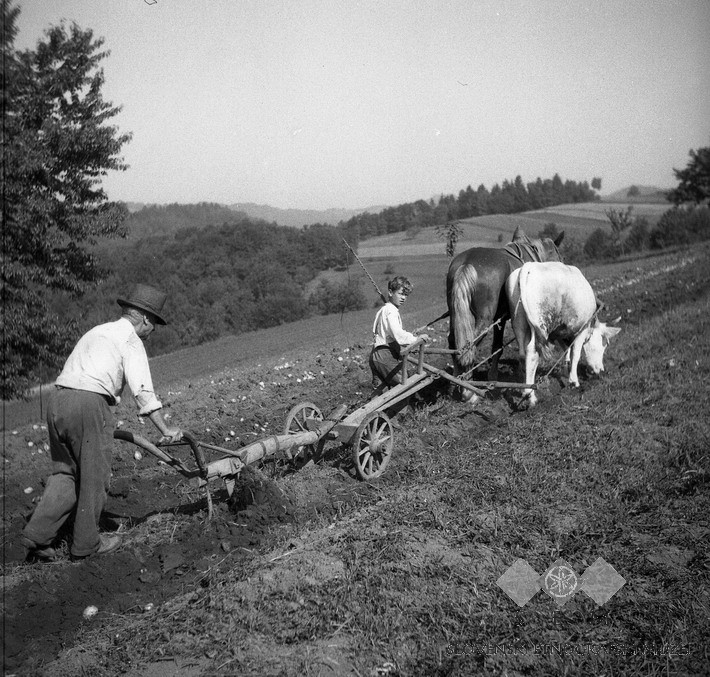 Orjejo, Blečji Vrh.